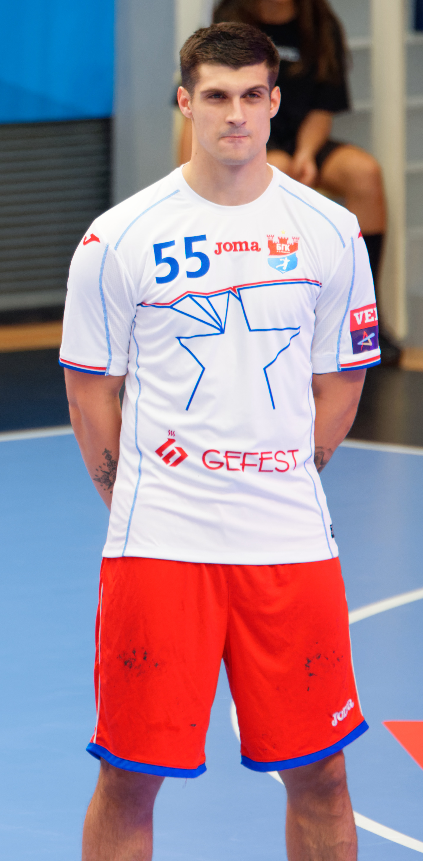 Rencontre de phase de groupe de la ligue des champions 2017/18 entre le PSG et Meshkov Brest A Coubertin le 24 septembre 2017.